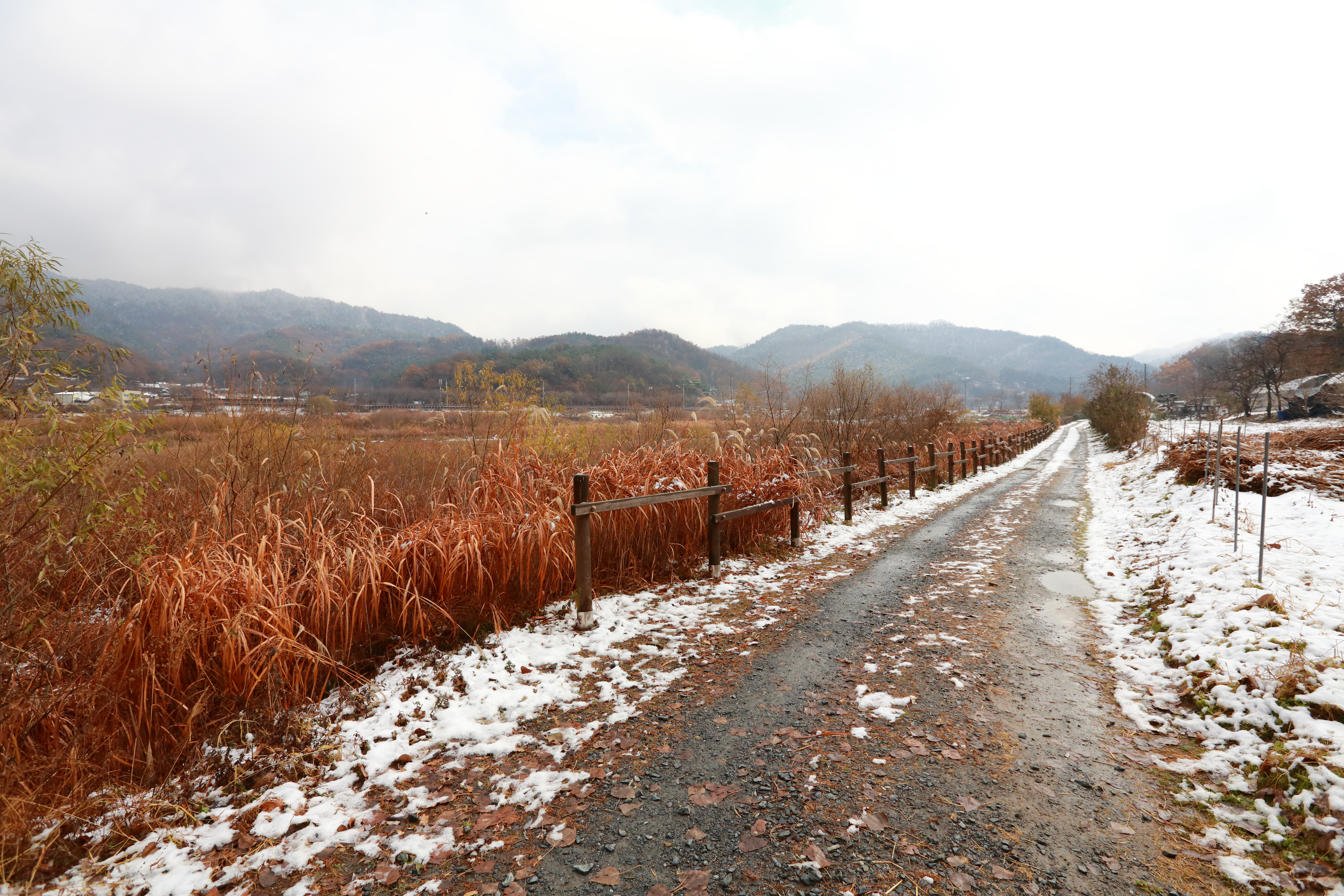 대청호오백리길 5구간_4